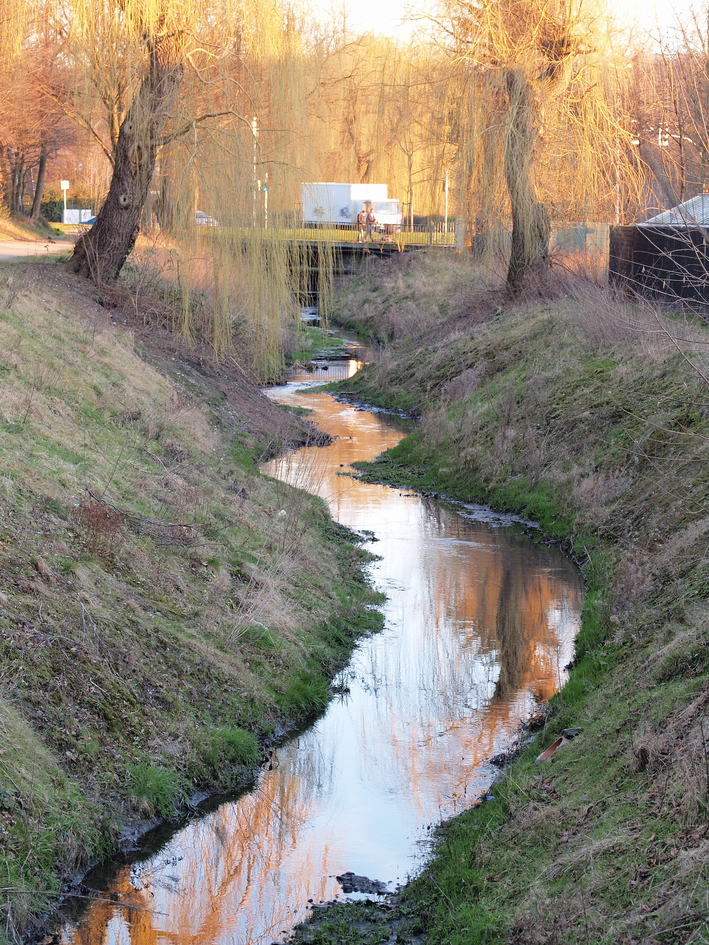 Renaturierter Verlauf des Ostbaches in Herne, Abschnitt westlich des Hölkeskampringes